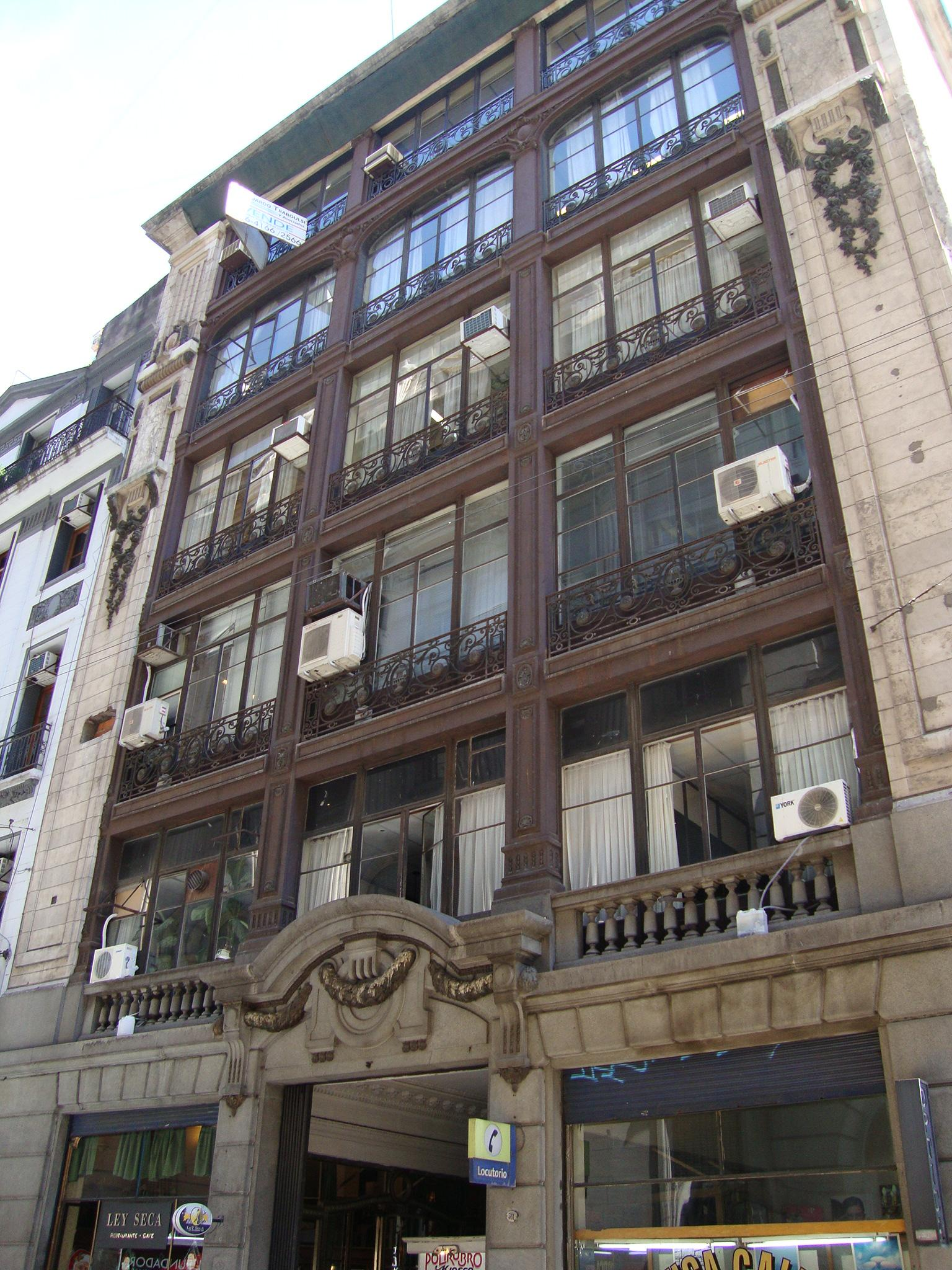 Frente sobre la calle Hipólito Yrigoyen del Pasaje Roverano (año 1918).